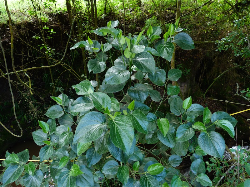 Cordoncillo Piper bogotense en Pasquilla, Bogotá, Colombia.